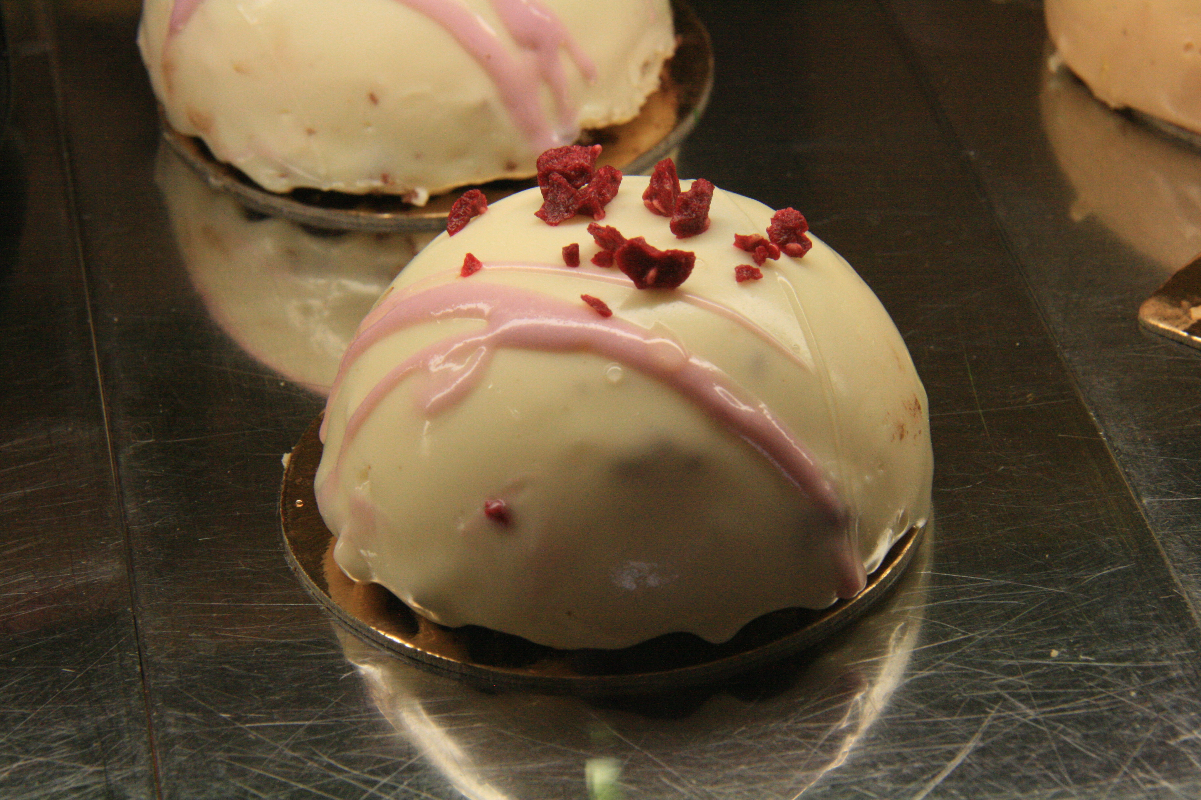 Pastel recubierto de chocolate blanco